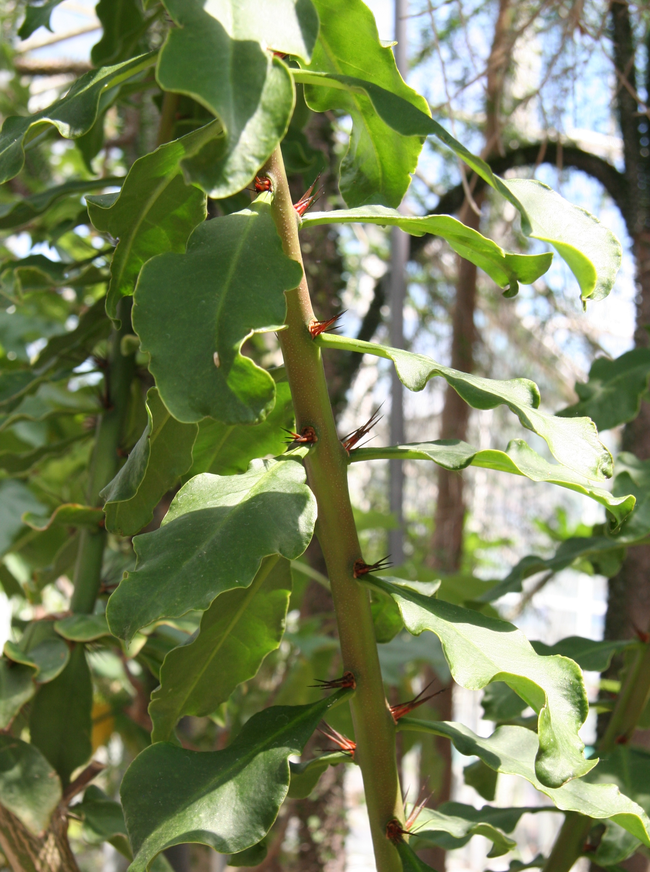 Pereskia stenantha in der Sukkulenten-Sammlung Zürich